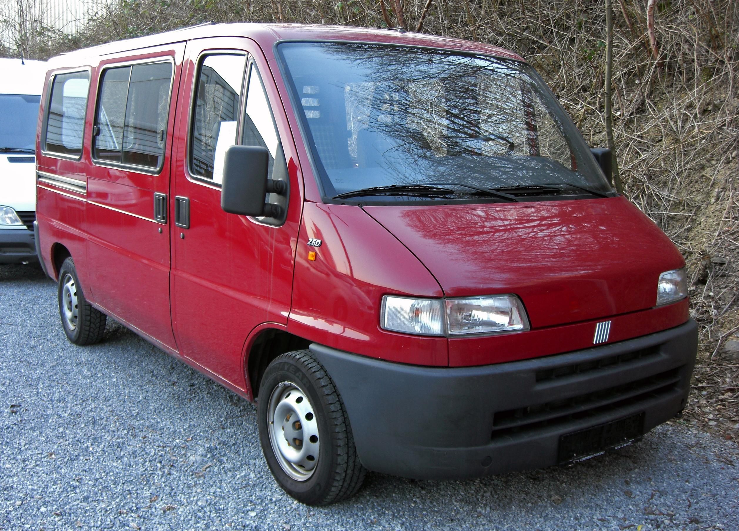 Fiat Ducato II